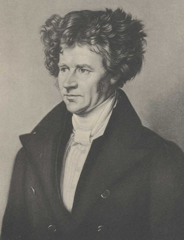 Bildnis des Greifswalder Professors August Friedrich Barkow